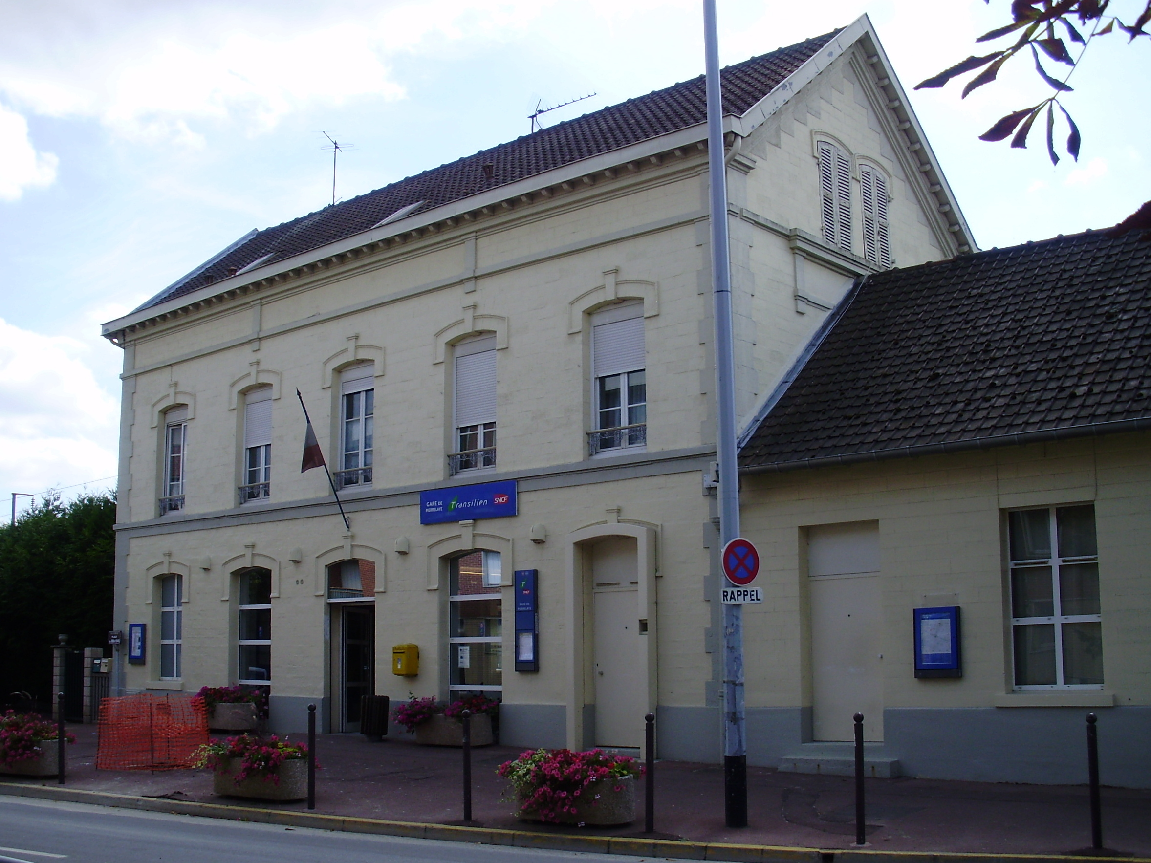 Gare de Pierrelaye, Val-d'Oise, France : bâtiment voyageurs vu depuis la voie publique